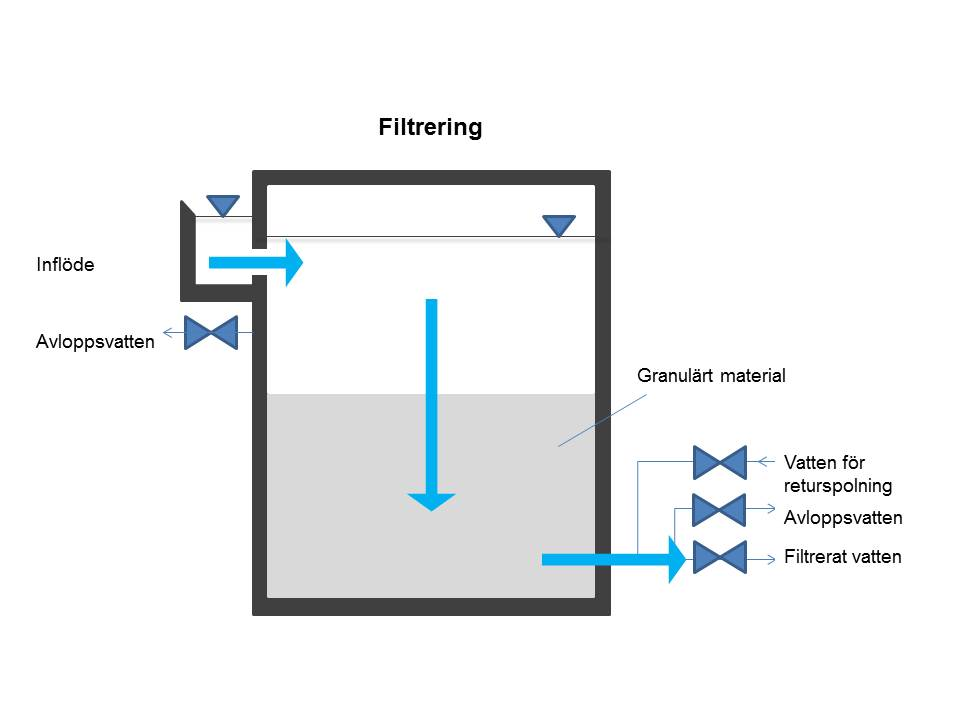 Filtrering i ett snabbfilter. Vatten renas genom granulärt material.